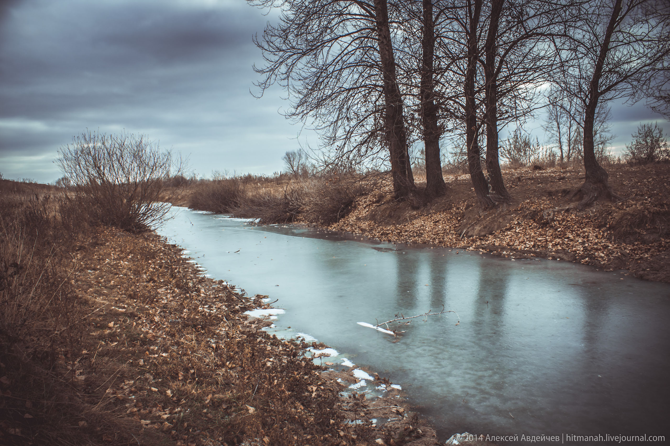 Замерзшая река Падовка, Самарская область